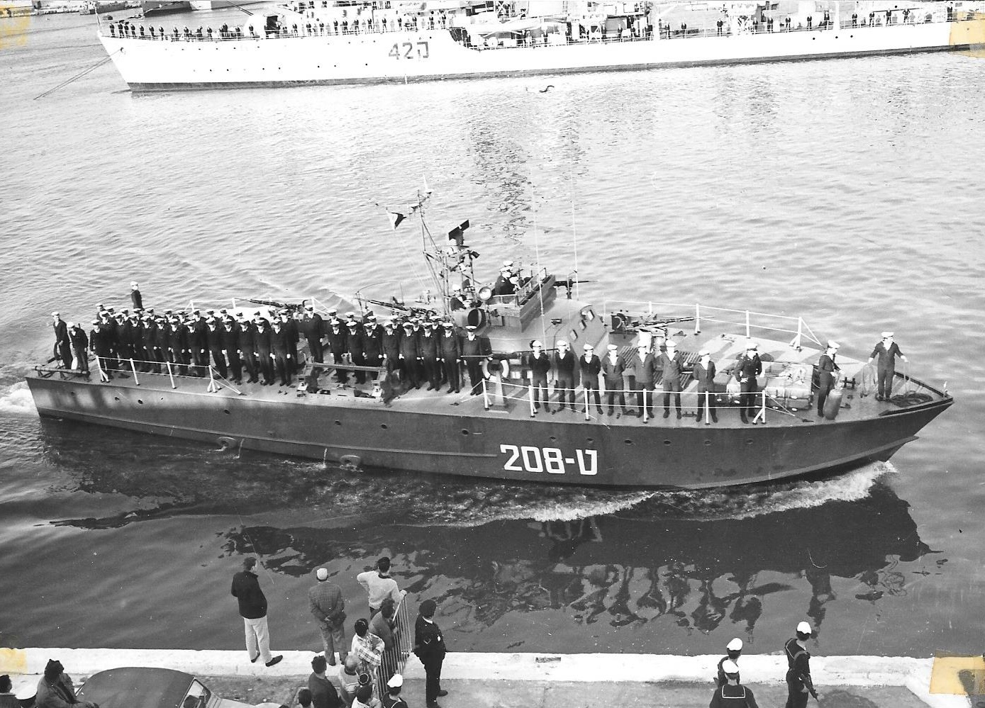 הטרפדת ט-208 תופסת את מקומה במסדר הכבוד לקבלת הצוללת אח"י תנין